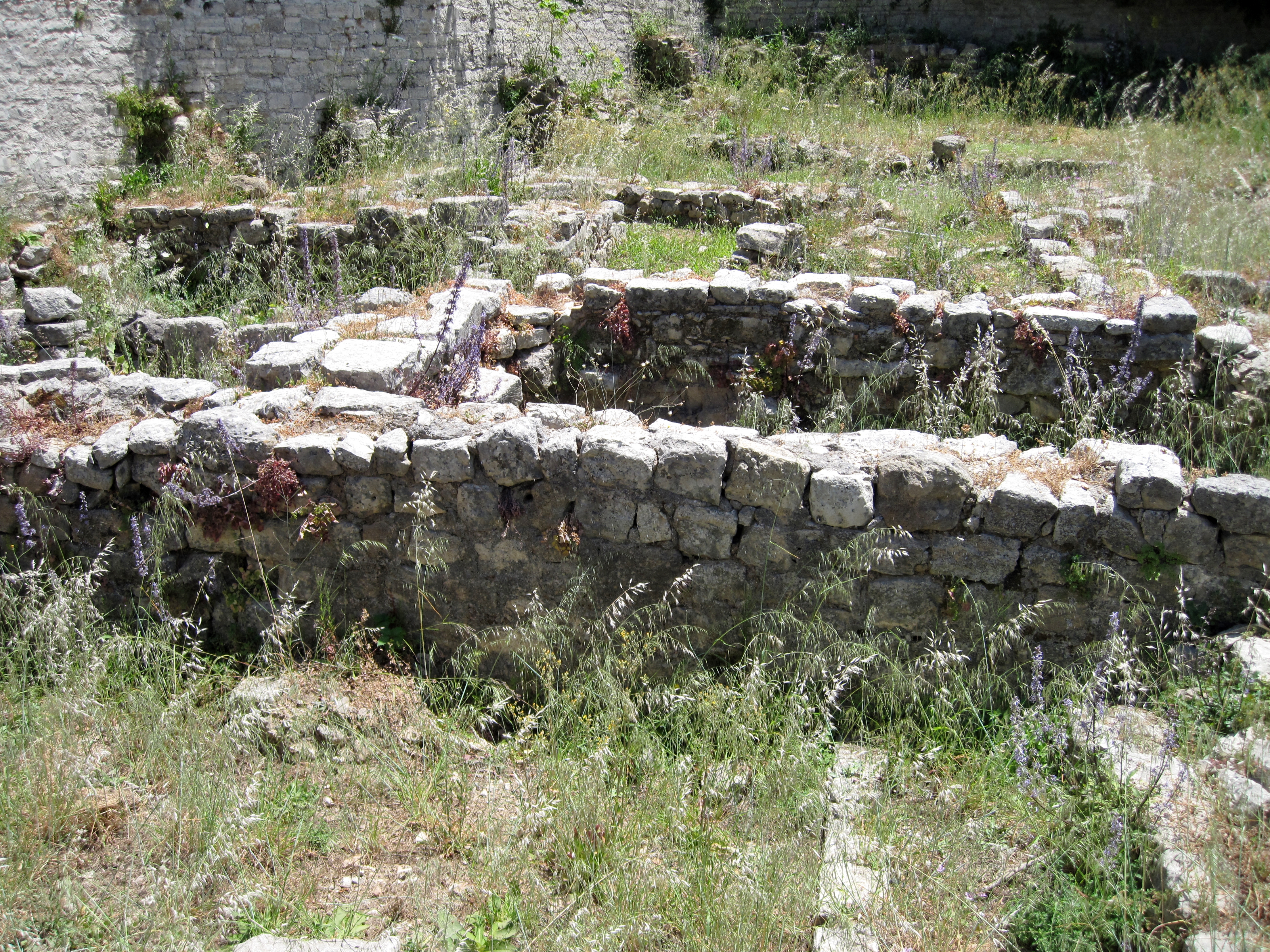 Reste der antiken Stadt Lappa neben der Hauptkirche von Argyroupoli, Gemeinde Rethymno, Regionalbezirk Rethymno, Kreta, Griechenland